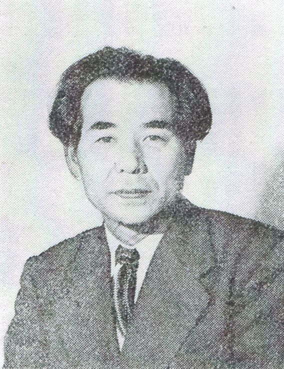 中島健蔵 等編『現代作家論叢書』第5巻（1955）より蔵原惟人